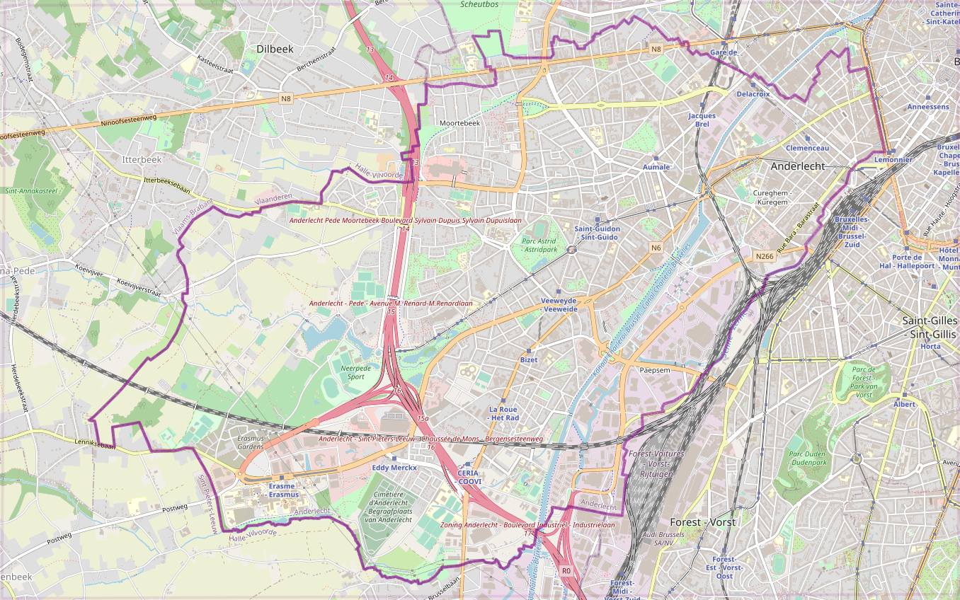 carte réalisée sur umap This map may be incomplete, and may contain errors. Don't rely solely on it for navigation.